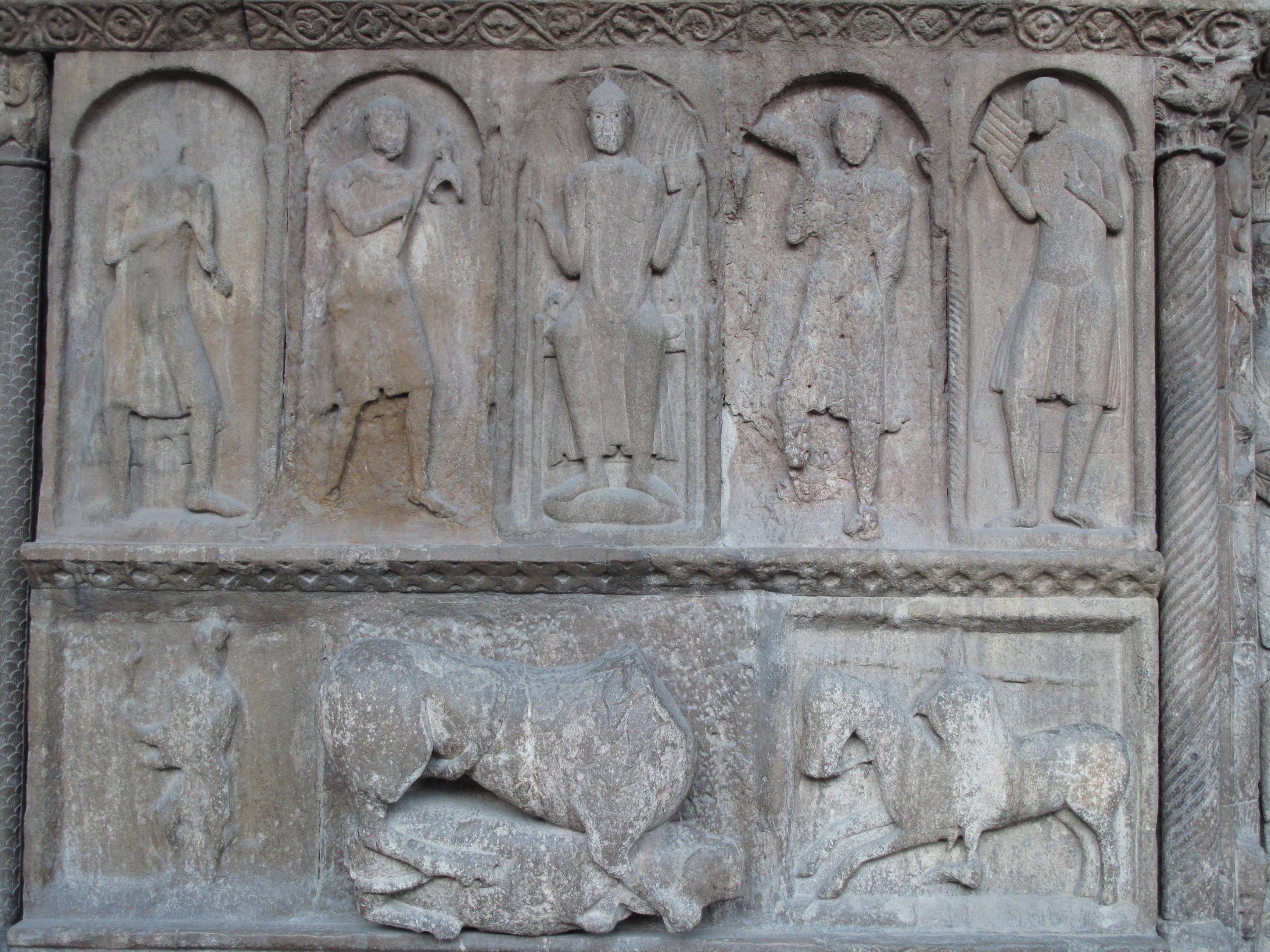 Santa Maria de Ripoll, relleu del pòrtic